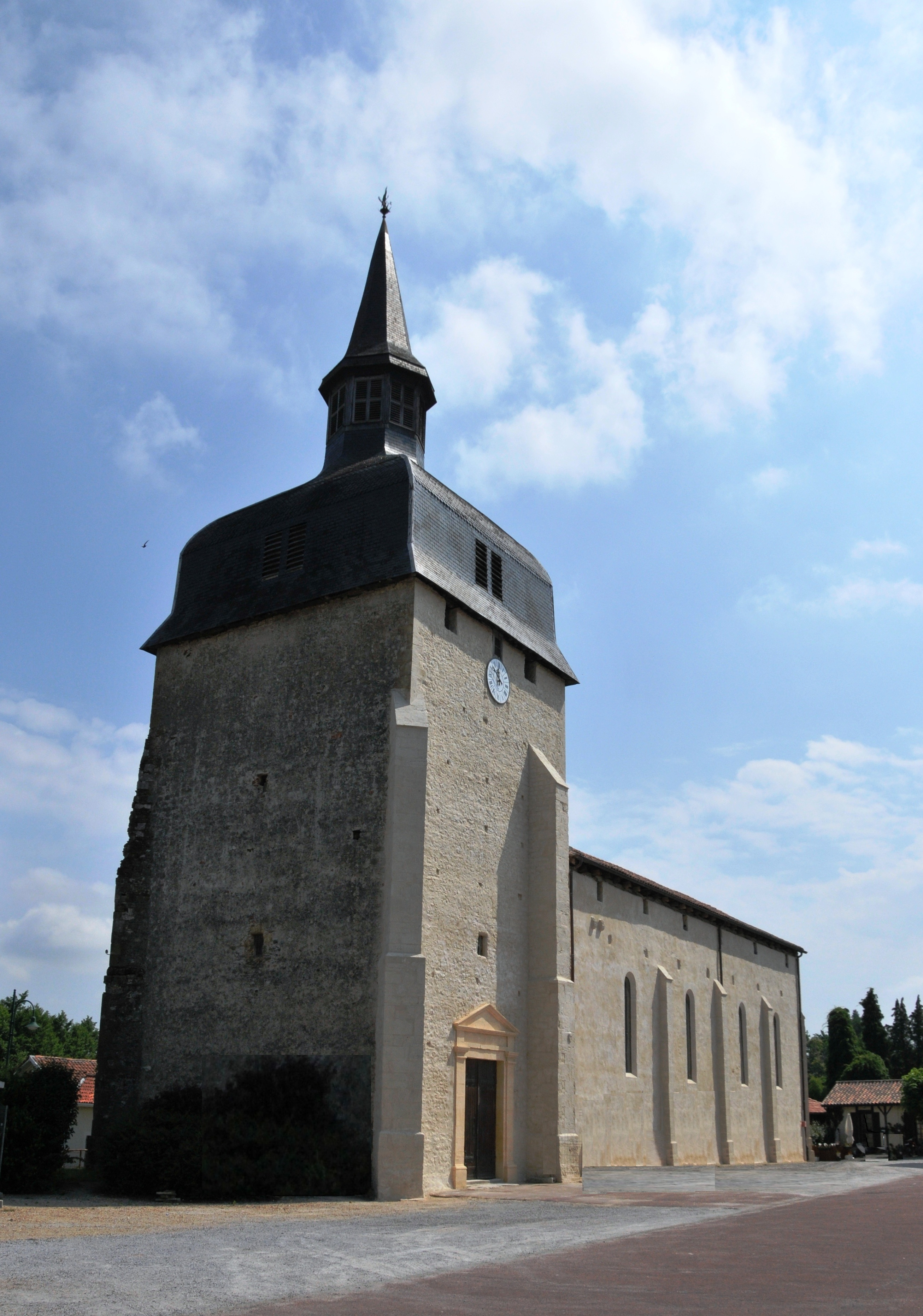 Magescq, Wehrkirche "Église Notre-Dame" aus dem 12. Jahrhundert